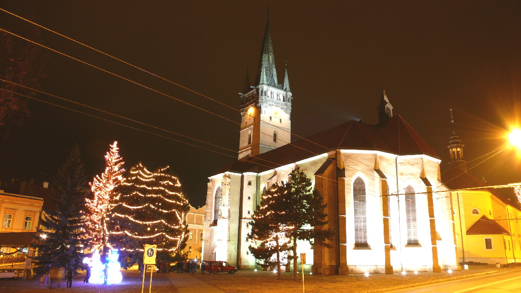 Konkatedrála sv. Mikuláša v Prešove, nočný pohľad na juhovýchodnú časť